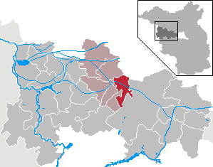 Paulinenaue in Brandenburg (Country) - District Havelland